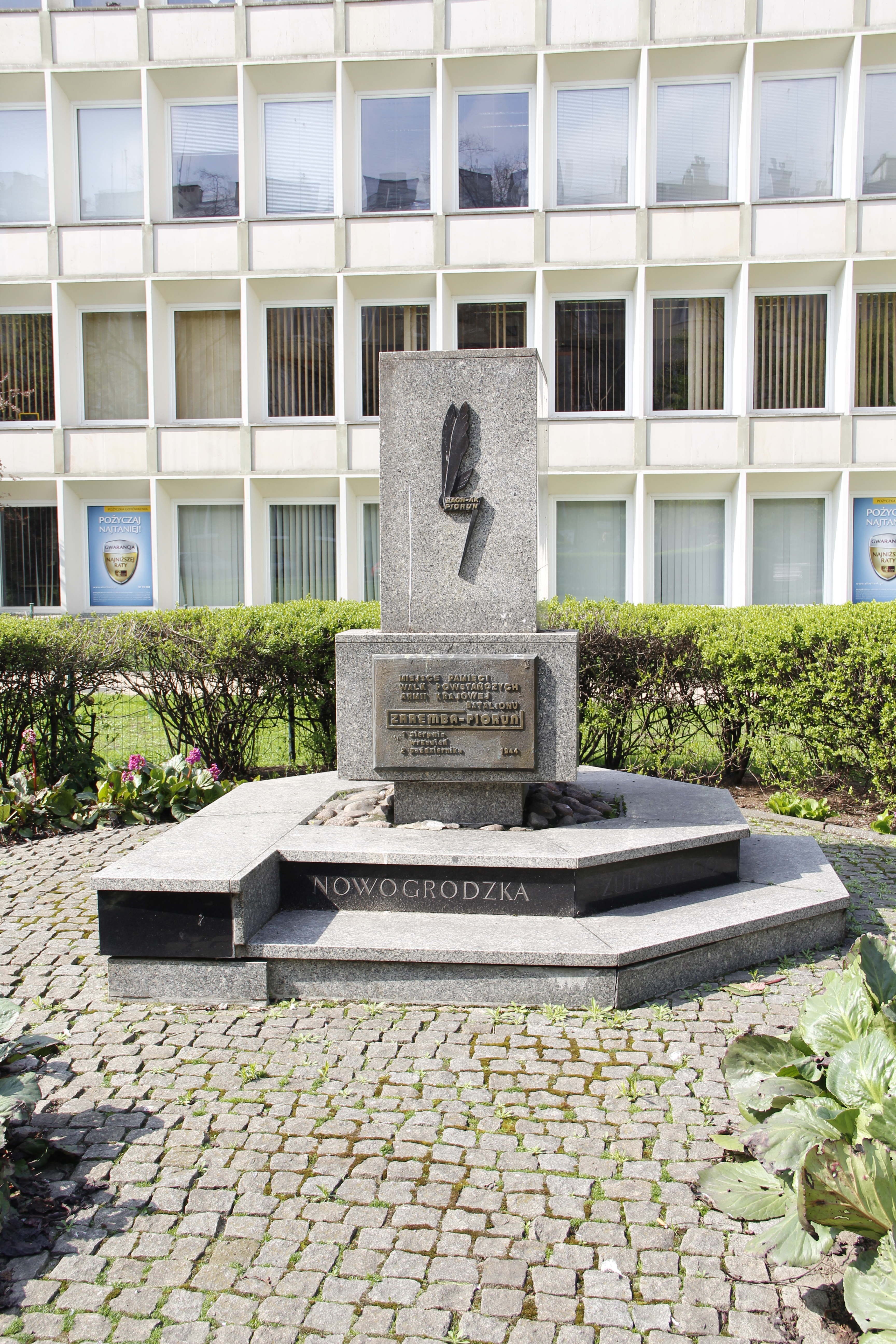 Zaremba-Piorun Battalion Monument, Warsaw